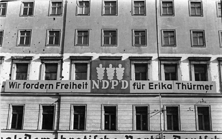 Berlin, Haus der NDPD Illus Schmidtke 23.10.1950 Freiheit für Erika Thürmer Am Haus der NDPD in Berlin ist eine Losung angebracht, die die Freilassung der von der französischen Besatzungsmacht in Westberlin verhafteten 15 jährigen Friedenskämpferin Erika Thürmer fordert